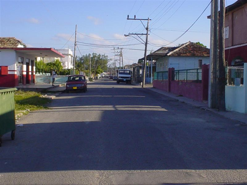 Calle Real en Cojimar